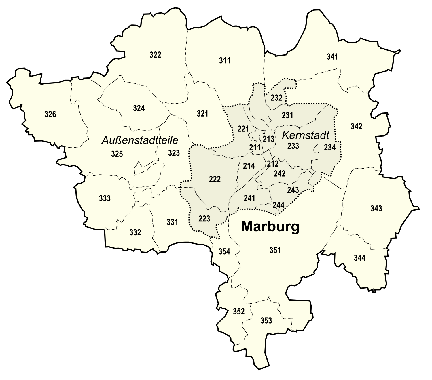 Karte der Statistischen Bezirke der Stadt Marburg